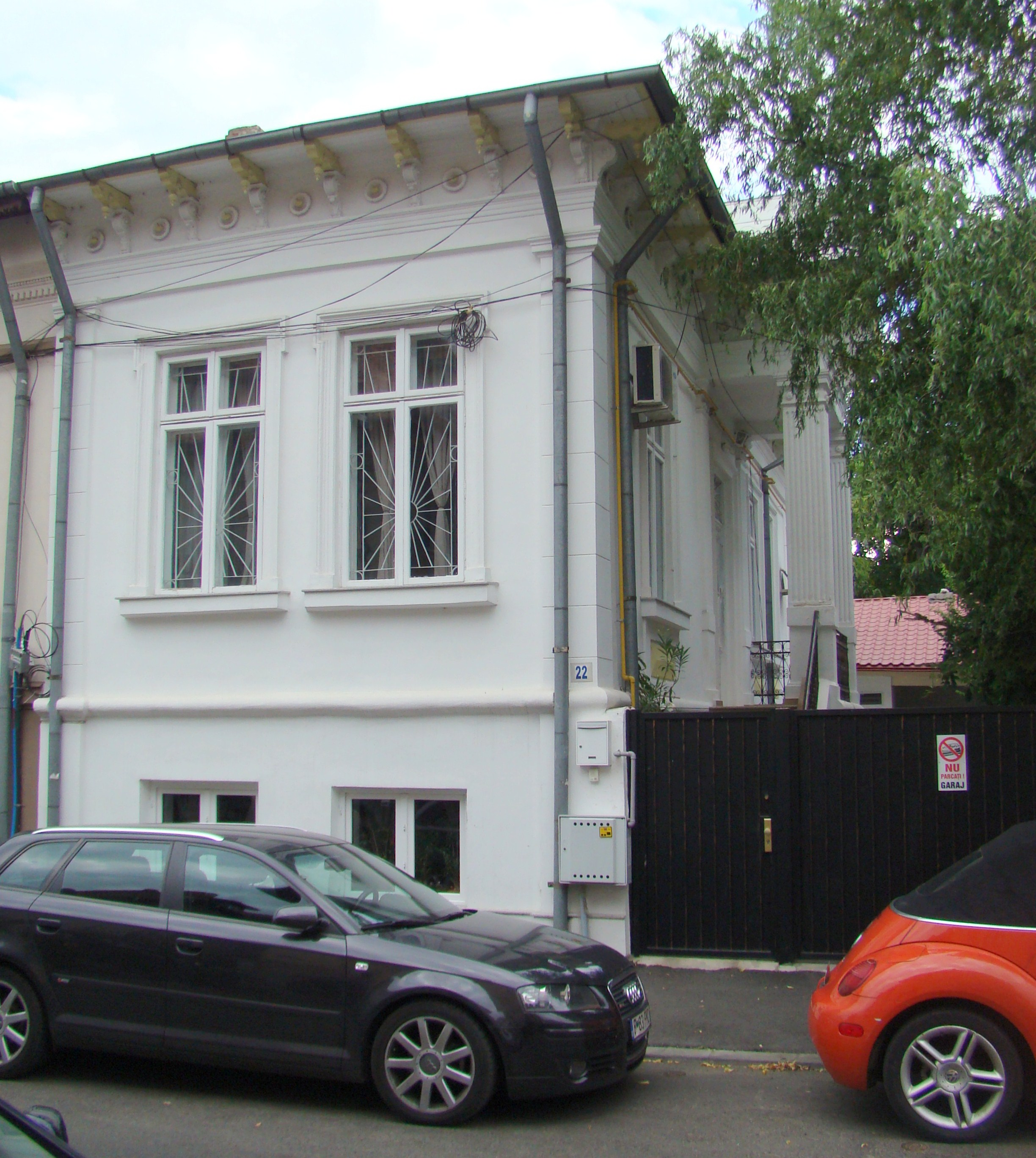 Clădire monument istoric, str. Louis Blank, nr.22